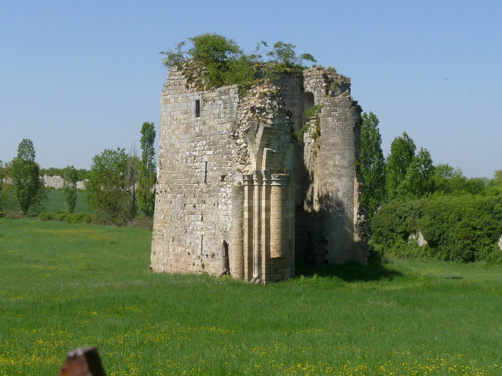 Ruines de l'abbaye des Dames, Tusson, Charente, France